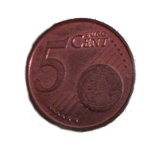 Moneda de cinco céntimos de euro